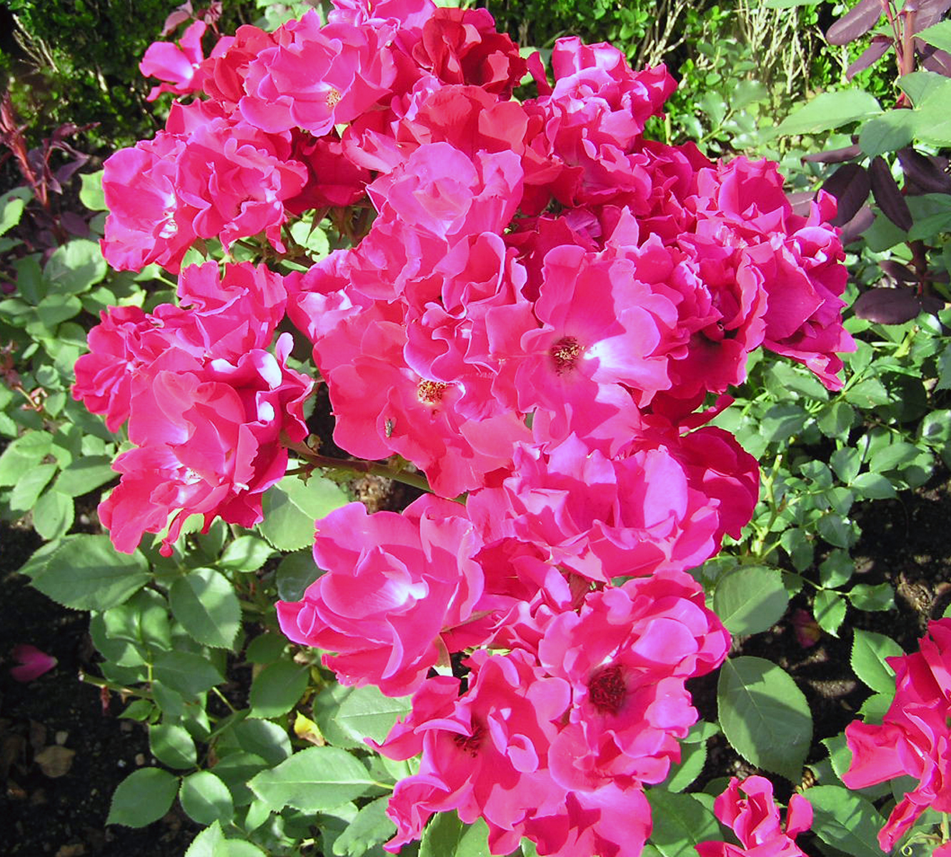 Description: Rose 'Holstein' (Kordes 1938) Source: Eigene Fotografie Date: 25. Juli 2005 Author: Schubbay lamblin fabrice